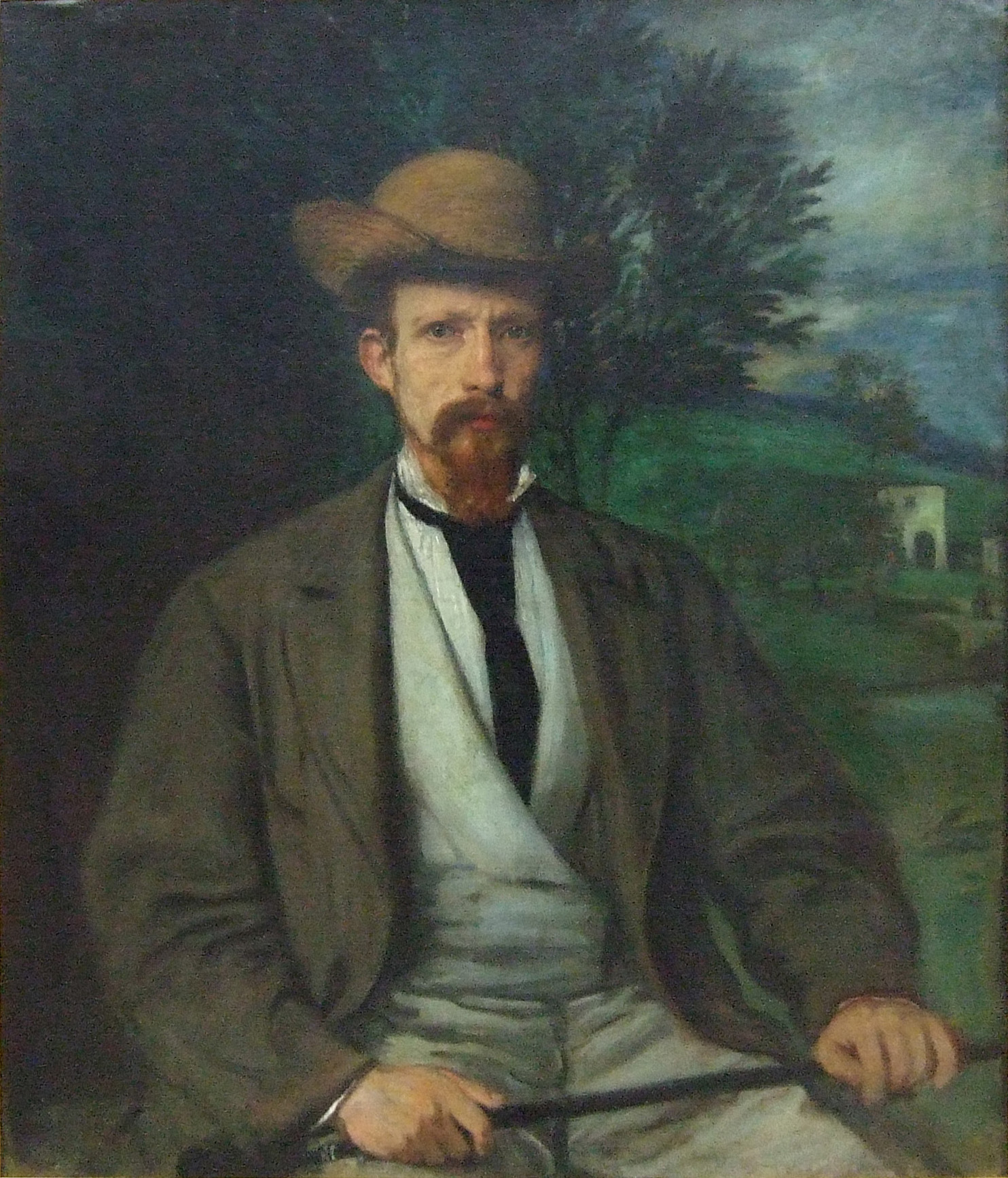 "In dem Bildnis mit dem gelben Hut, mit der bitterbösen Stirnfalte, Fiedlers Lieblingsbild, kann man den Sanguiniker erkennen, der seinen Freunden nicht bequem war." - Julius Meier-Graefe